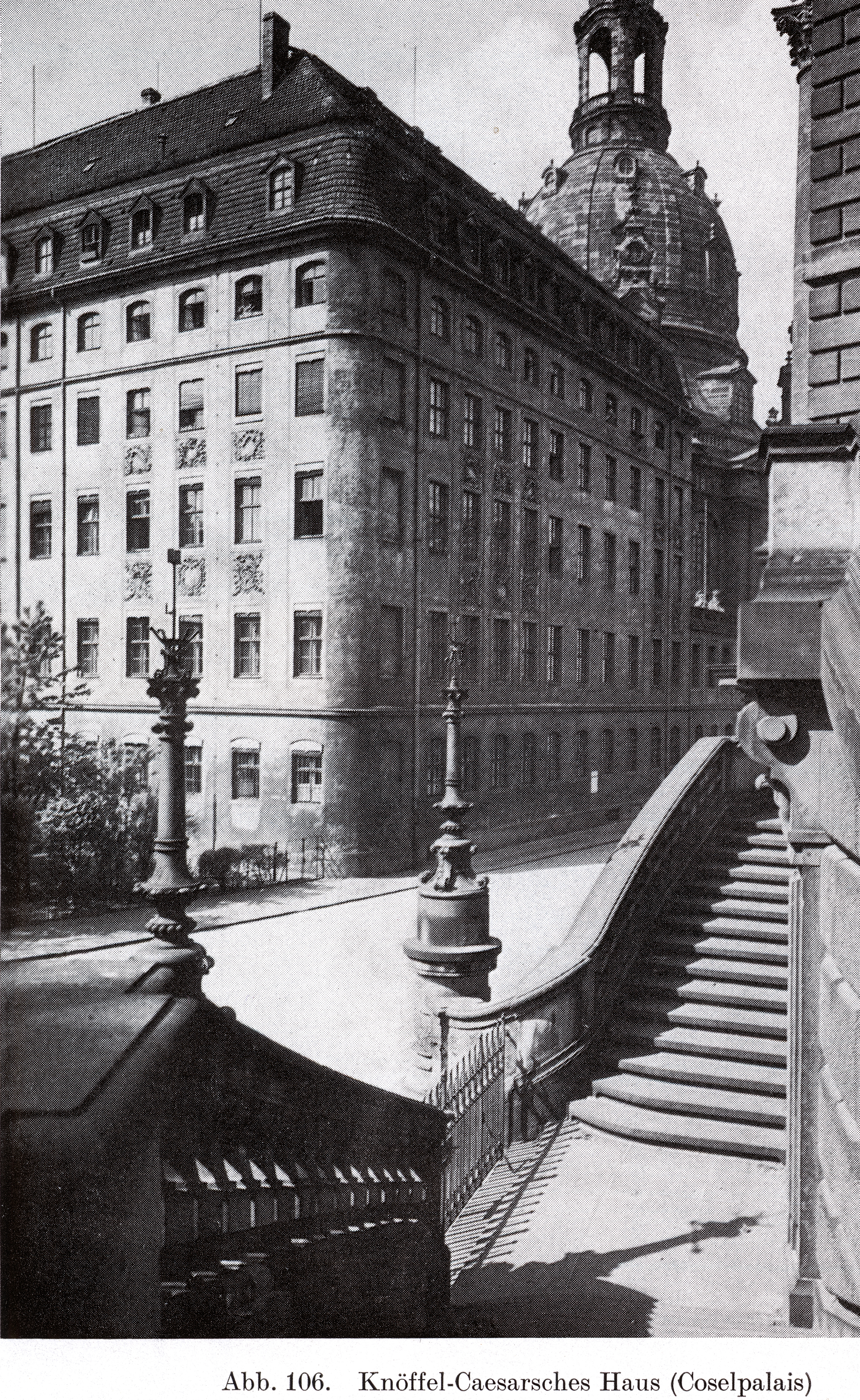 Dresden, Knöffel-Cäsarsches Haus (Coselpalais), version c